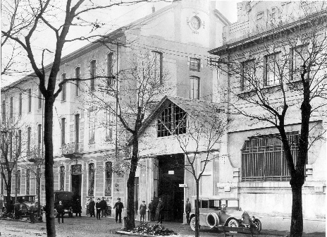 1916. Stabilimenti Fiat di Corso Dante, Torino. Oggi sede del Centro Storico Fiat